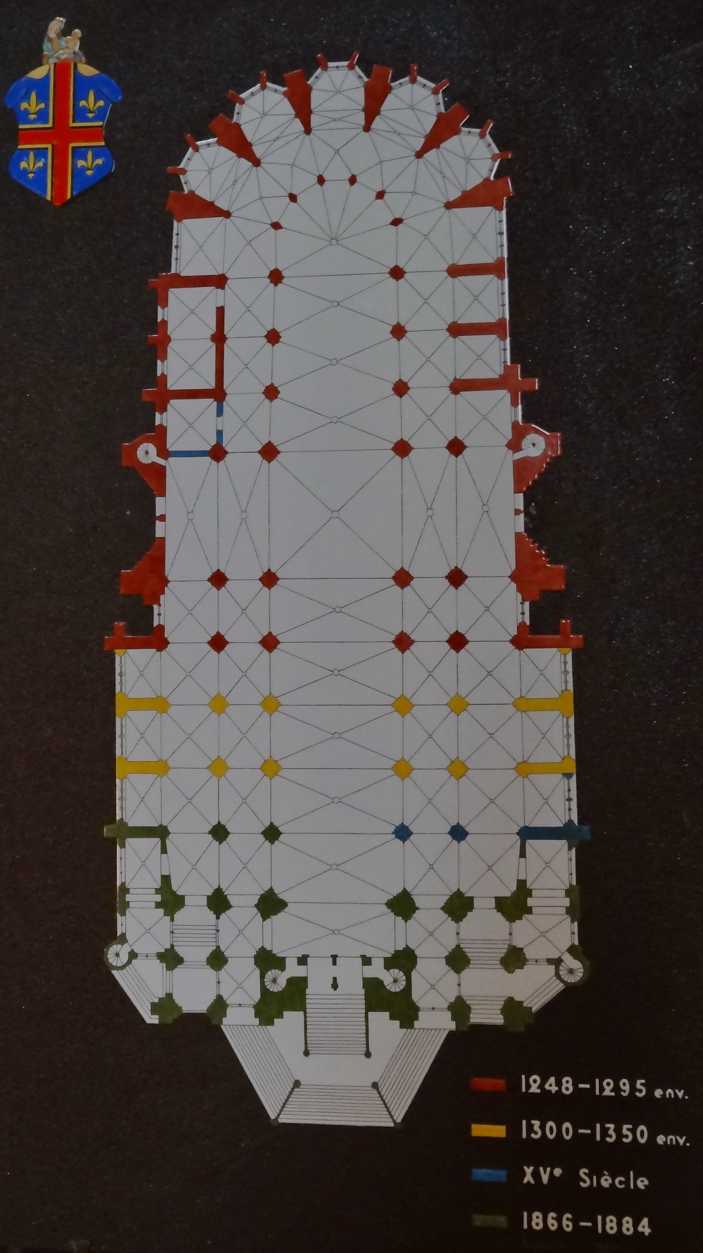 Plan de la cathédrale de Clermont